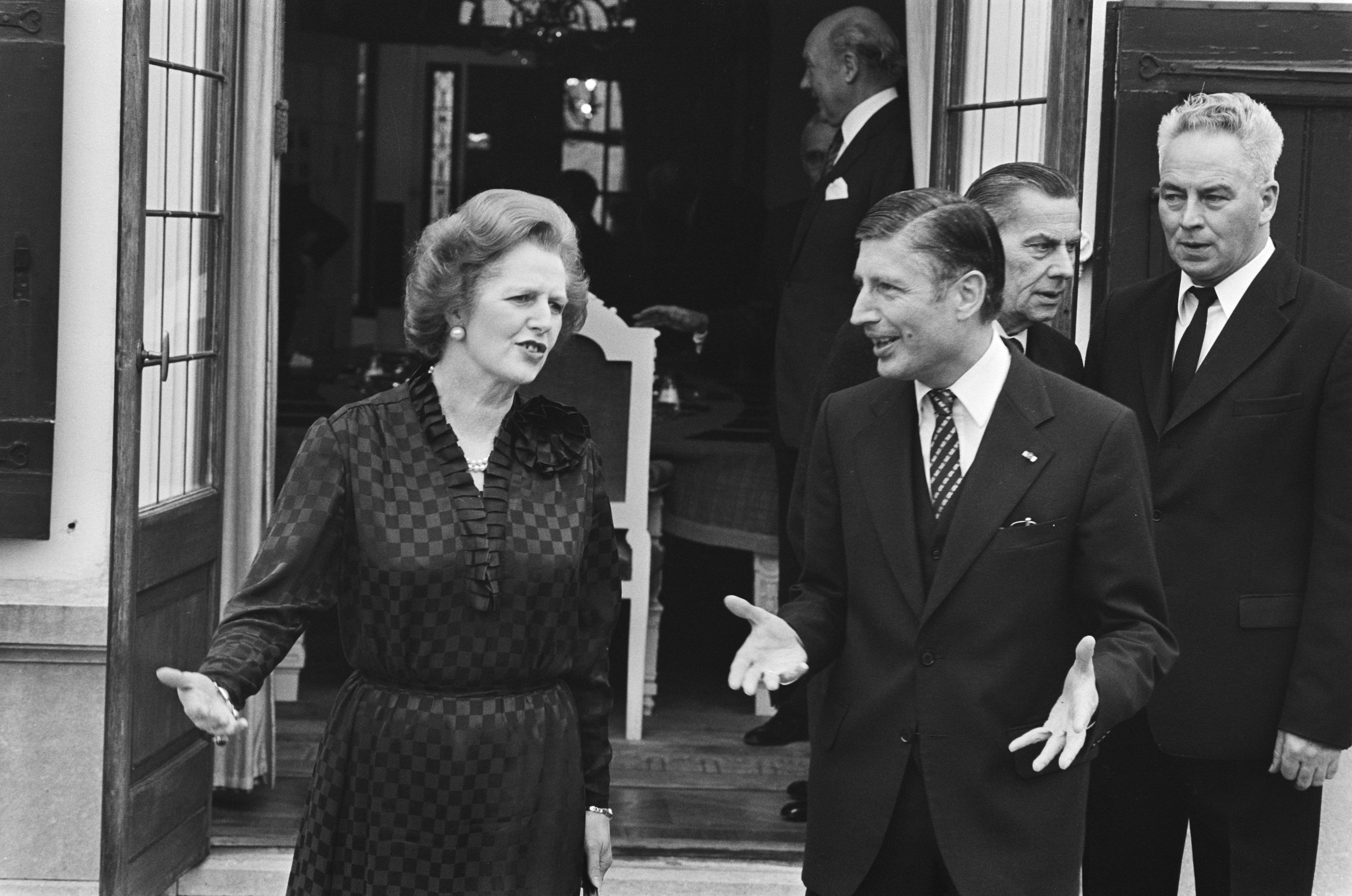 Collectie / Archief : Fotocollectie Anefo Reportage / Serie : [ onbekend ] Beschrijving : V.l.n.r. Premier Margareth Thatcher en Minister-President Dries van Agt op het terras van het Catshuis Datum : 6 februari 1981 Locatie : Den Haag, Zuid-Holland Trefwoorden : ambtswoningen, bezoeken, meubilair, ministers-presidenten Persoonsnaam : Agt, Dries van, Thatcher, Margaret Fotograaf : Antonisse, Marcel / Anefo, [onbekend] Auteursrechthebbende : Nationaal Archief Materiaalsoort : Negatief (zwart/wit) Nummer archiefinventaris : bekijk toegang 2.24.01.05 Bestanddeelnummer : 931-3060